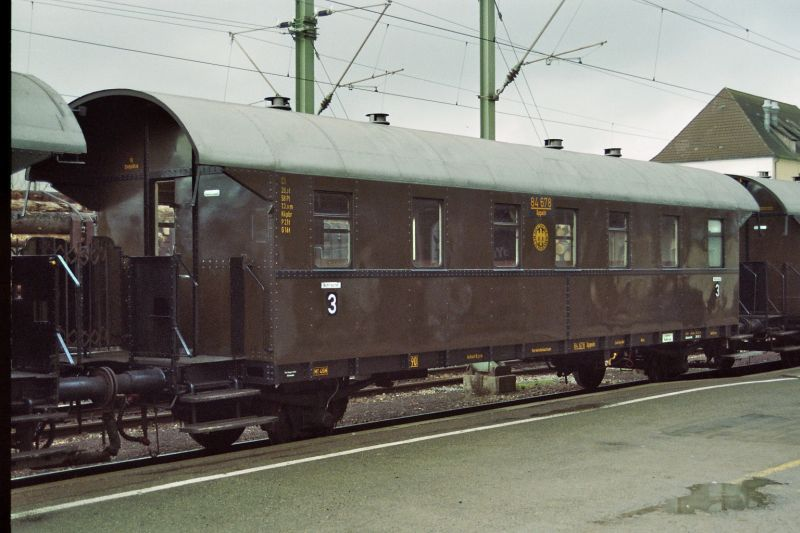 Donnerbüchse - Zweiachsiger Einheits Durchgangswagen bei SEH Sonderfahrt am 08.12.2007 in Crailsheim